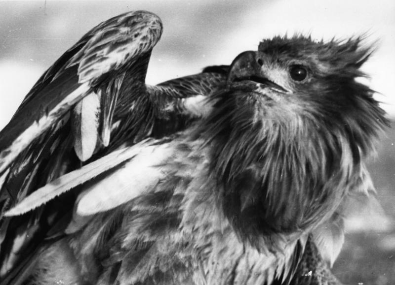 Kianglager, Palasseeadler